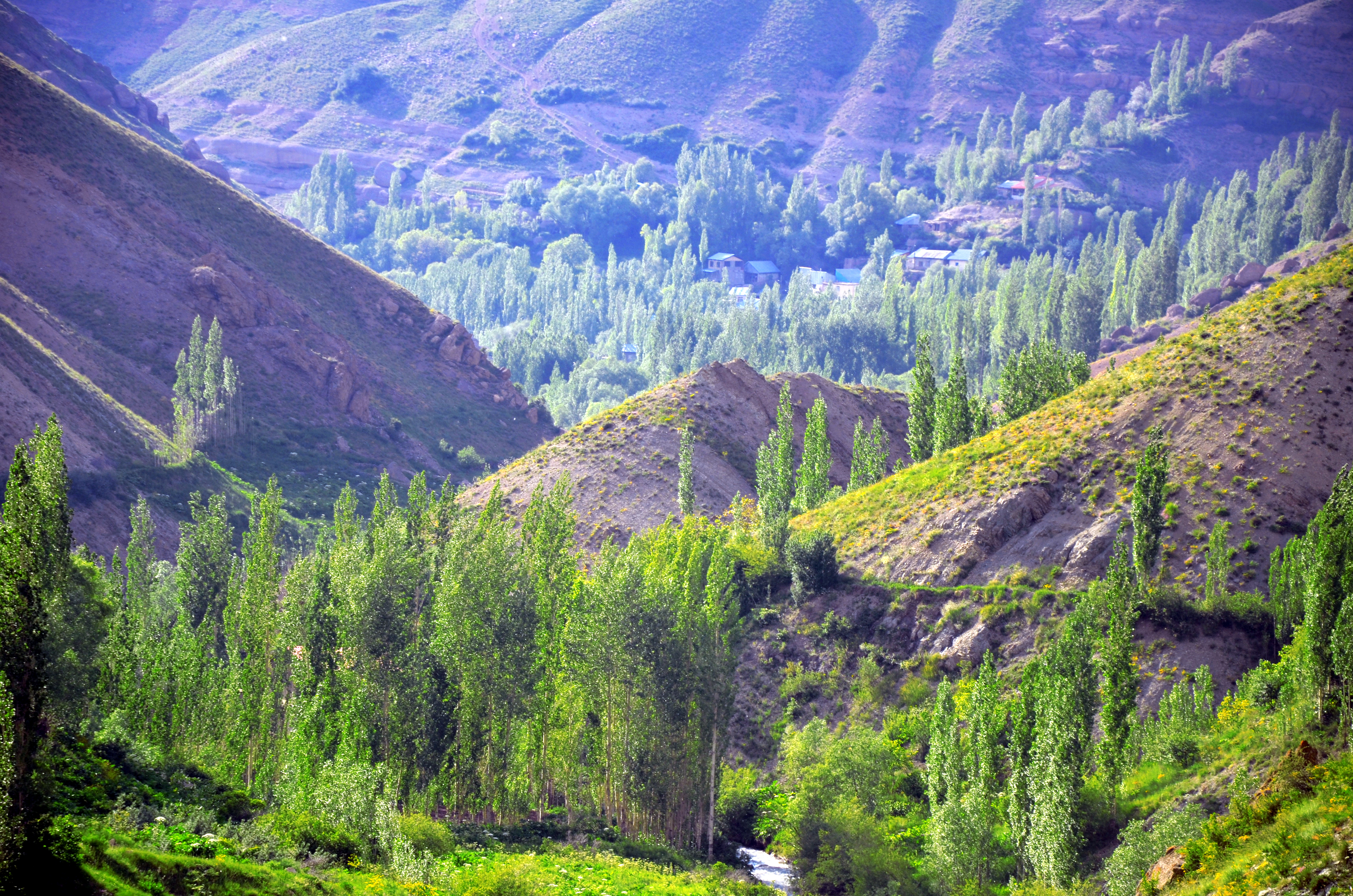 Alborz - Kahar - Gateh Deh road